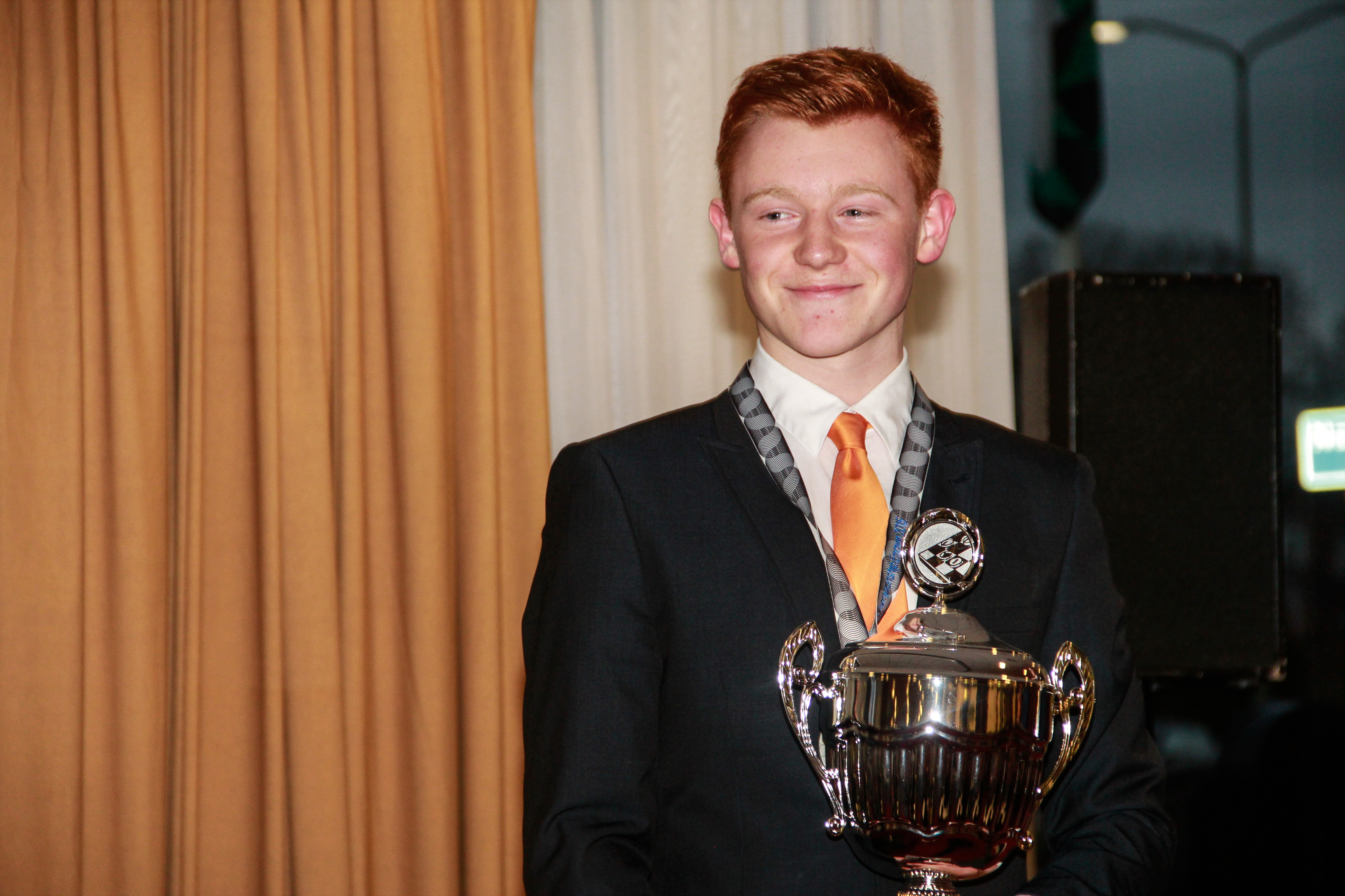 Draughts player Jan Groenendijk during the 2015 World Draughts Championship